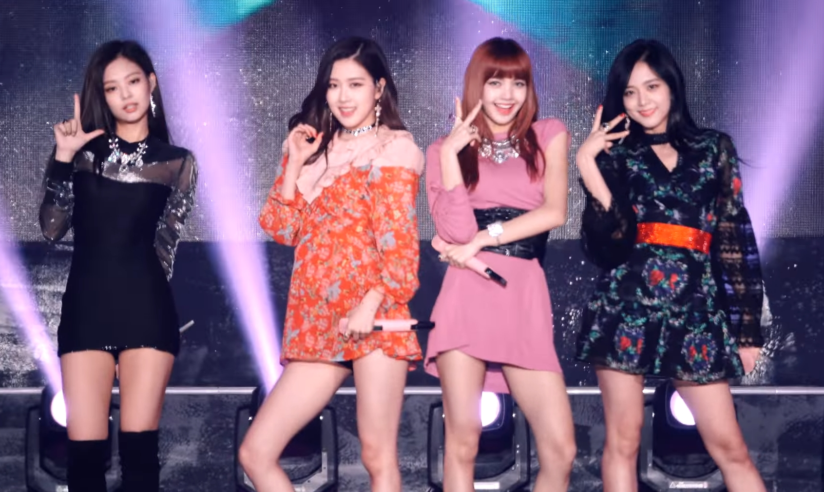 171001 코리아뮤직페스티벌 Korea Music Festival 블랙핑크(BlackPink) - 마지막처럼 4K fancam by RAS